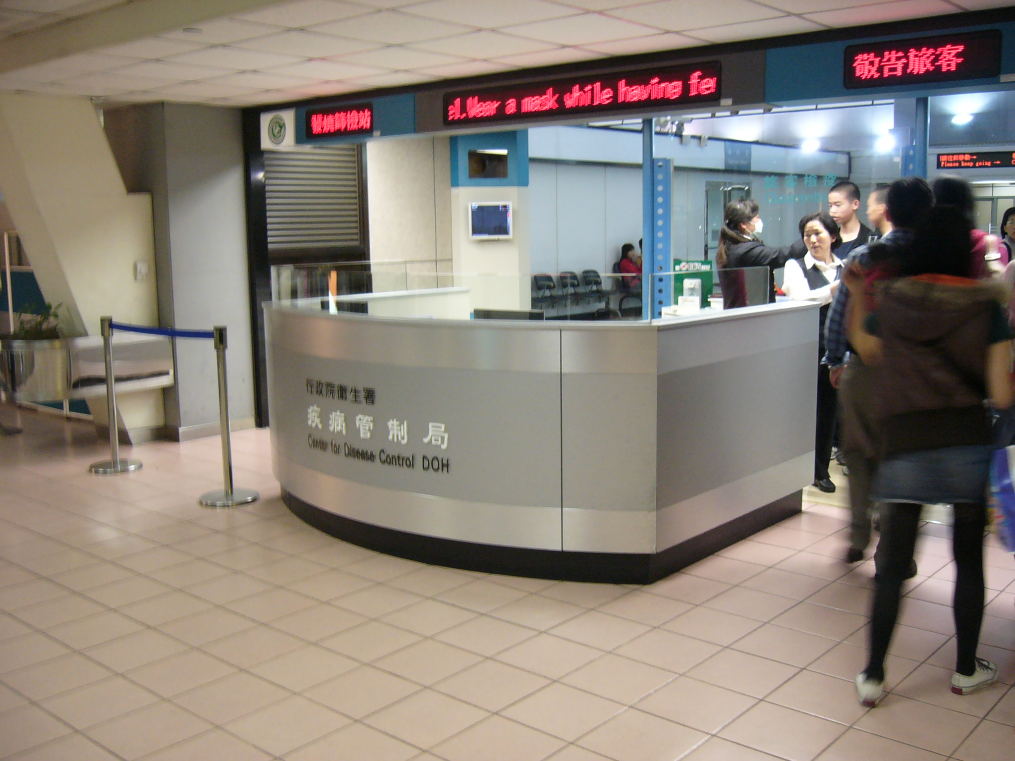 臺灣桃園國際機場第一航廈，行政院衛生署疾病管制局發燒篩檢站外側。